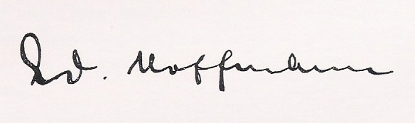 Unterschrift des deutschen Unternehmers Eduard Hoffmann (1832-1894)